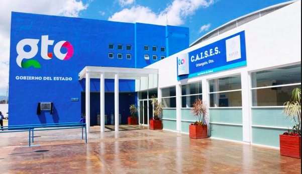 Entrada Principal del CAISES Uriangato en la colonia Las Aguilillas.